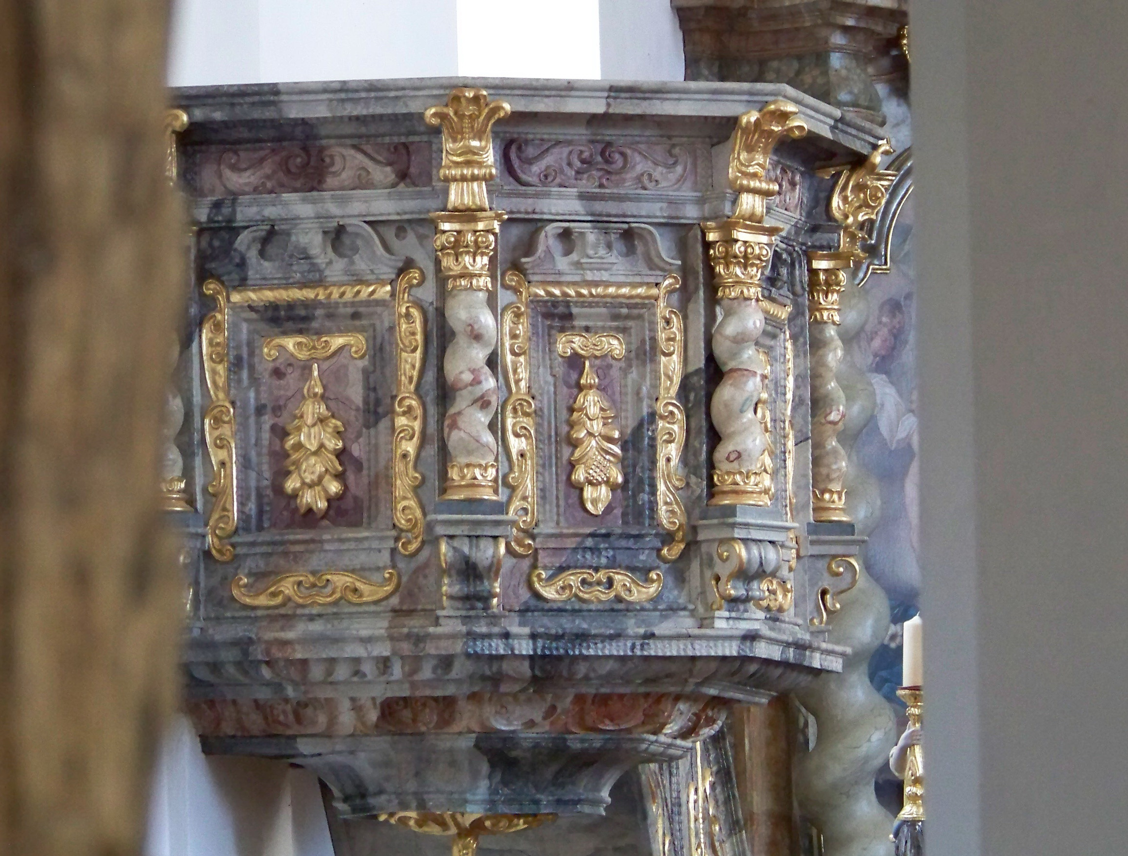 Rottenburg an der Laaber. Inkofen, Haus Nr. 117. Katholische Pfarrkirche Mariä Reinigung mit Kapelle. Saalkirche aus der zweiten Hälfte 15. Jahrhunderts. Barocker Ausbau in der Mitte des 17. Jahrhunderts. Barocke Kanzel um 1688 mit polygonalem Korpus und gewundenen Ecksäulchen. In den Feldern Laub- und Fruchtgehänge.